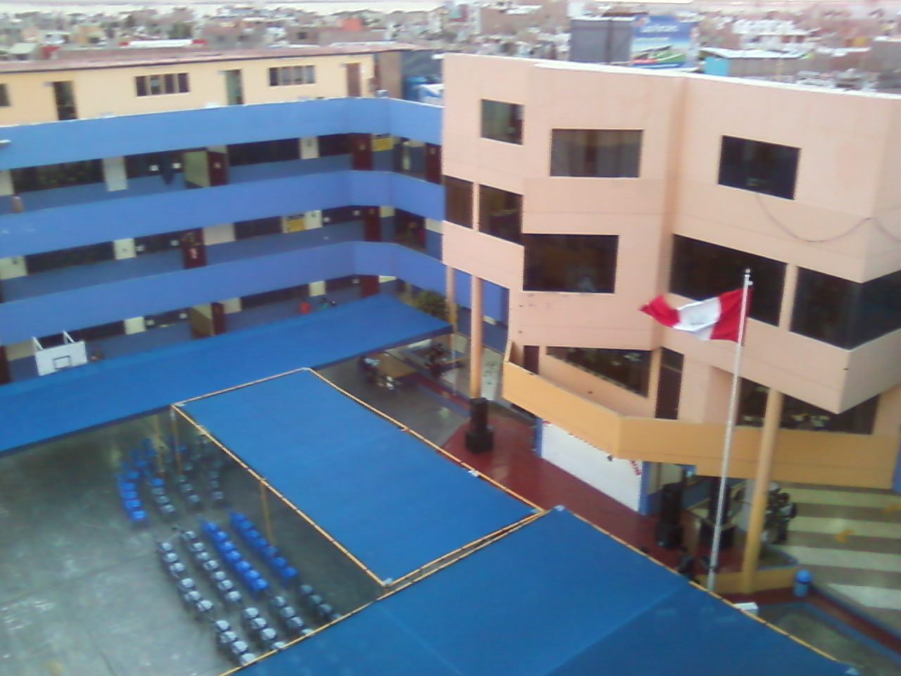 Interior del pool de aulas de la USP en Nuevo Chimbote, Perú.